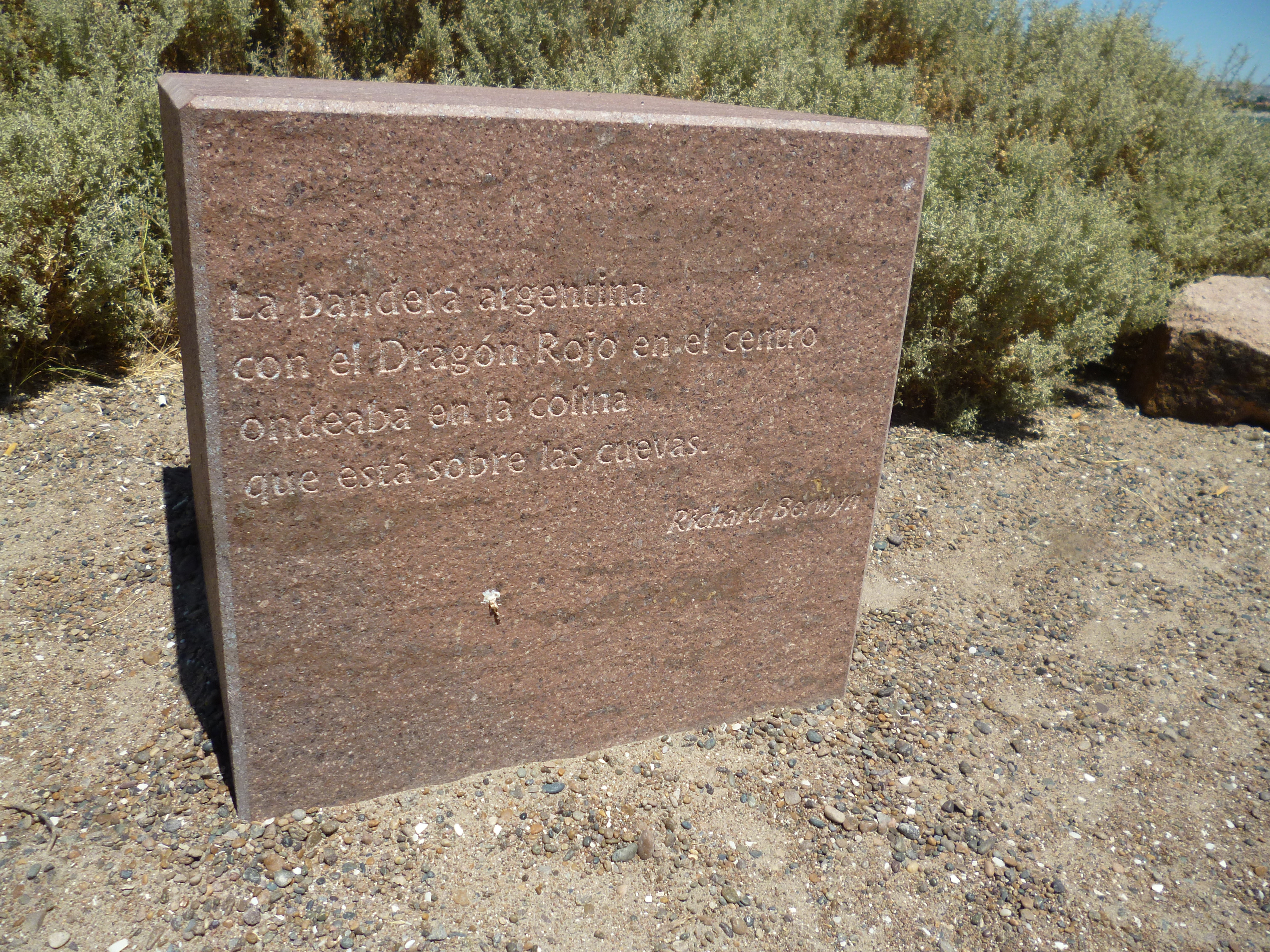 Monumento al desembarco galés, Punta Cuevas, Y Wladfa. La placa contiene los nombres de todos los colonos llegados en el Mimosa